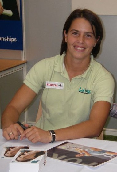 La caméra c'est par là ... Cropped by --Magnus Manske 14:41, 6 October 2007 (UTC)